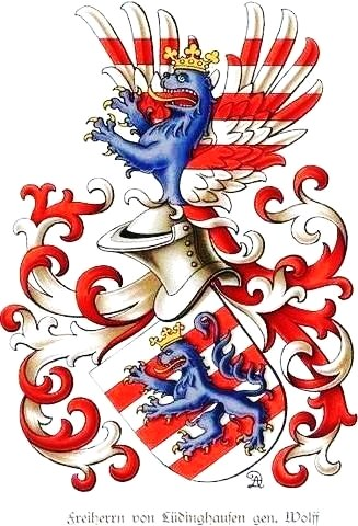 Stammwappen der v. Lüdinghausen gen. Wolff und ihrer Seitenlinie der Schulte v. Soest